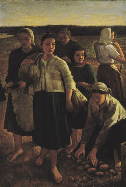 中文（台灣）: 李梅樹作品：黃昏，1948年，油畫。 《黃昏》是李梅樹的代表作品之一，李梅樹以自己女兒們為模特兒，如大女兒麗霞、二女兒麗月、三女兒麗玉等著農裝入畫，至為親切傳神。 創造了這幅膾炙人口的鄉土鉅作，每每為大家所欣賞，尤其是描繪臺灣鄉村婦女勤勞樸實一面，黃昏時，人物背後長而舒緩的水平線，象徵大地無盡而莊嚴的生命力。